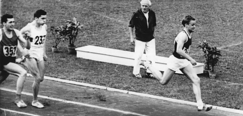 Heinz Erbstößer, Peter Wallach Zentralbild Wendorf 30.9.62 XIII. Deutsche Leichtathletikmeisterschaften in Dresden Vom 28.9.-30.9.1962 finden im Dresdener Heinz-Steyer-Stadion die XIII. Deutschen Leichtathletikmeisterschaften 1962 statt. Insgesamt werden 32 Titel vergeben, um die sich 650 Männer und Frauen bewerben. UBz: Der 100-m-Endlauf der Männer gewann Heinz Erbstößer (SC Rotation Leipzig) mit 10,6 Sekunden sicher. Ganz links Peter Wallach (Startnr. 357) und Falgowski Start) .